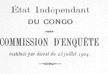 Page de garde du rapport officiel de la commission d'enquête devant rendre compte des exactions commises dans l'Etat Indépendant du Congo.